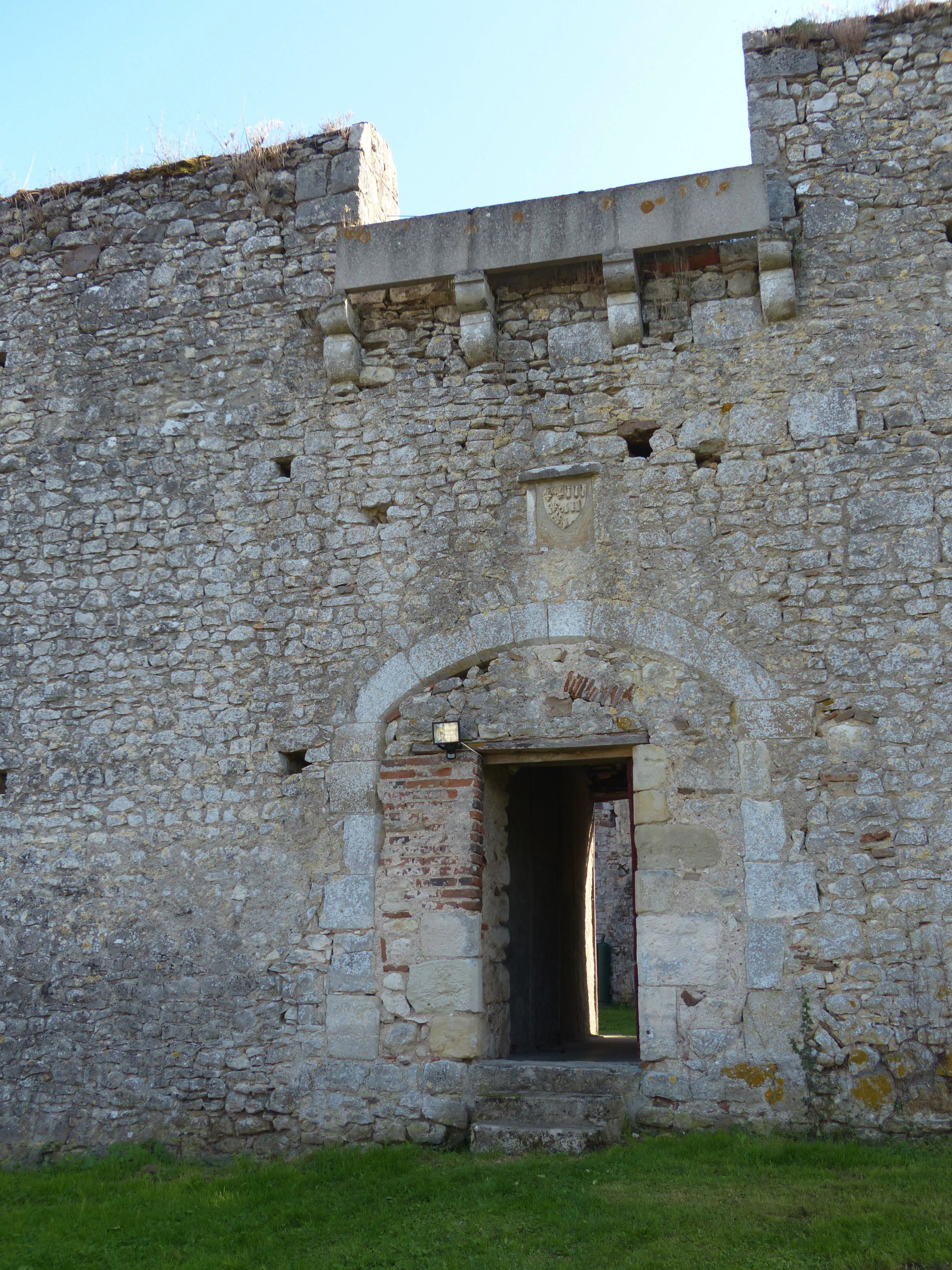 Château du Châtelard, Ébreuil (Allier). Porte de l'enceinte médiévale intérieure. Au-dessus de la porte, blason à identifier.